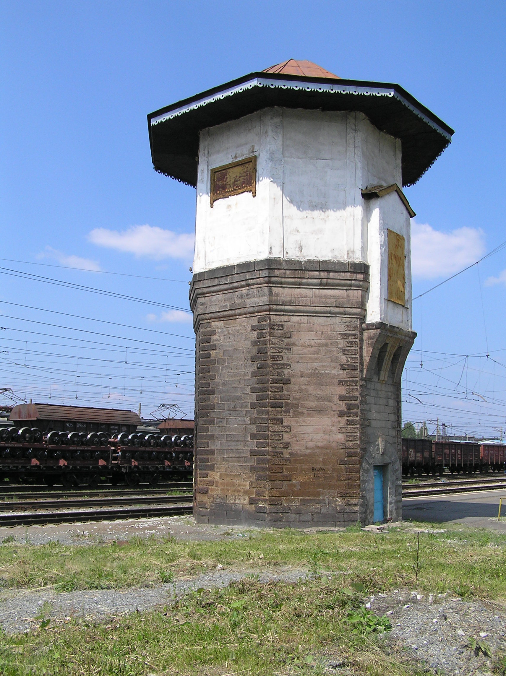 Водонапорная башня на ст. Гороблагодатская, Свердловская ж.д.